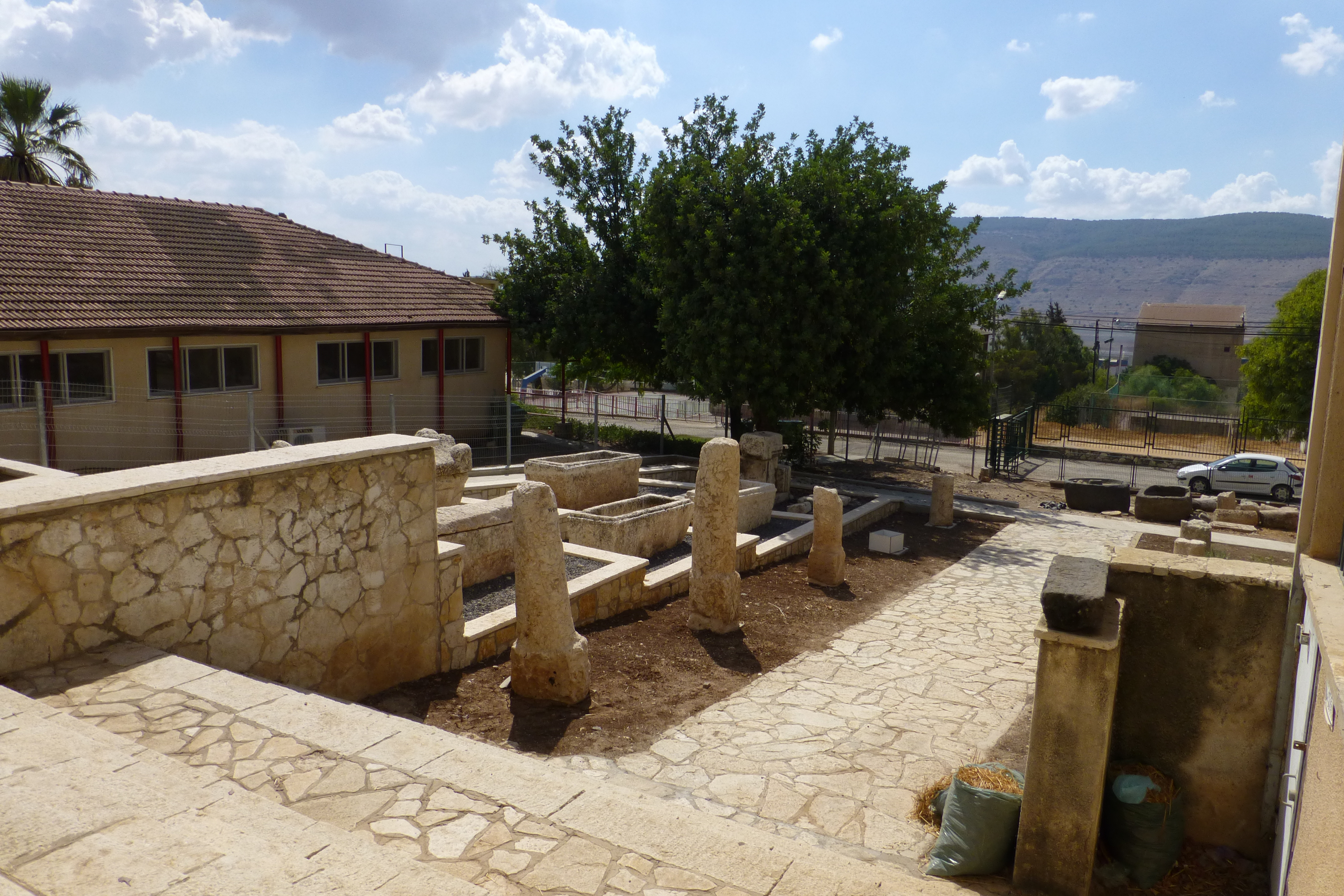 מוזיאון בית שטורמן המצוי בקיבוץ עין חרוד מאוחד נוסד בשנת 1941 על ידי חבר הקיבוץ שמואל סבוראי כמוזיאון לטבע.